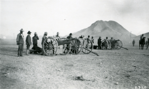 Tropas de la División del Norte en sus posiciones con artillería de cañones, la foto fue tomada en un punto al noroeste de la ciudad de Chihuahua, el Cerro Grande se eleva prominente al fondo.